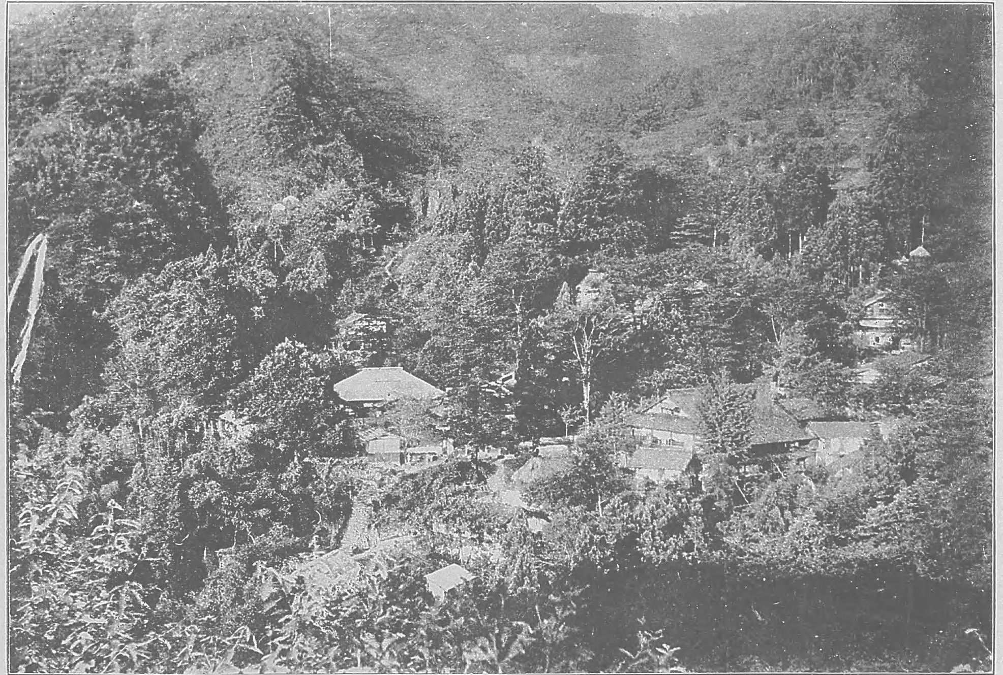 説明文に「中新川郡大岩村に在り奇石怪巌全山を形成し大小の瀑布其間に懸る幽景邃趣人寰を脱し韻士墨客踵を接す寺あり日石寺と云ふ精舎清浄にして丈六の不動尊石像を安置す威容儼然賽者常に麕す」とあり